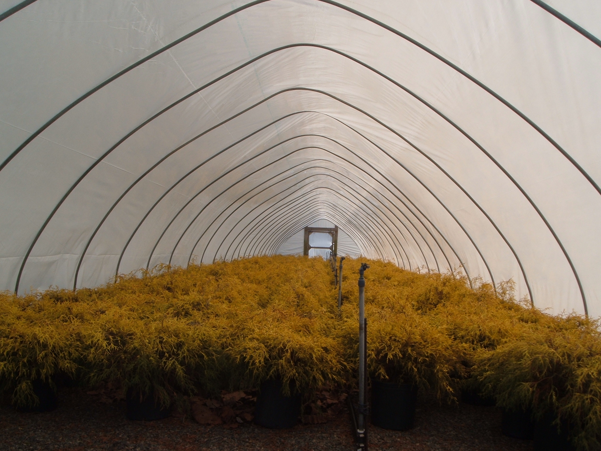 Source: Max Wahrhaftig